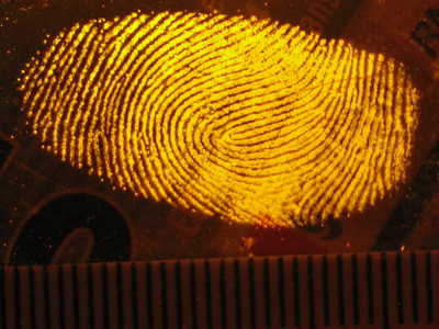 Odbitka w świetle żółtym